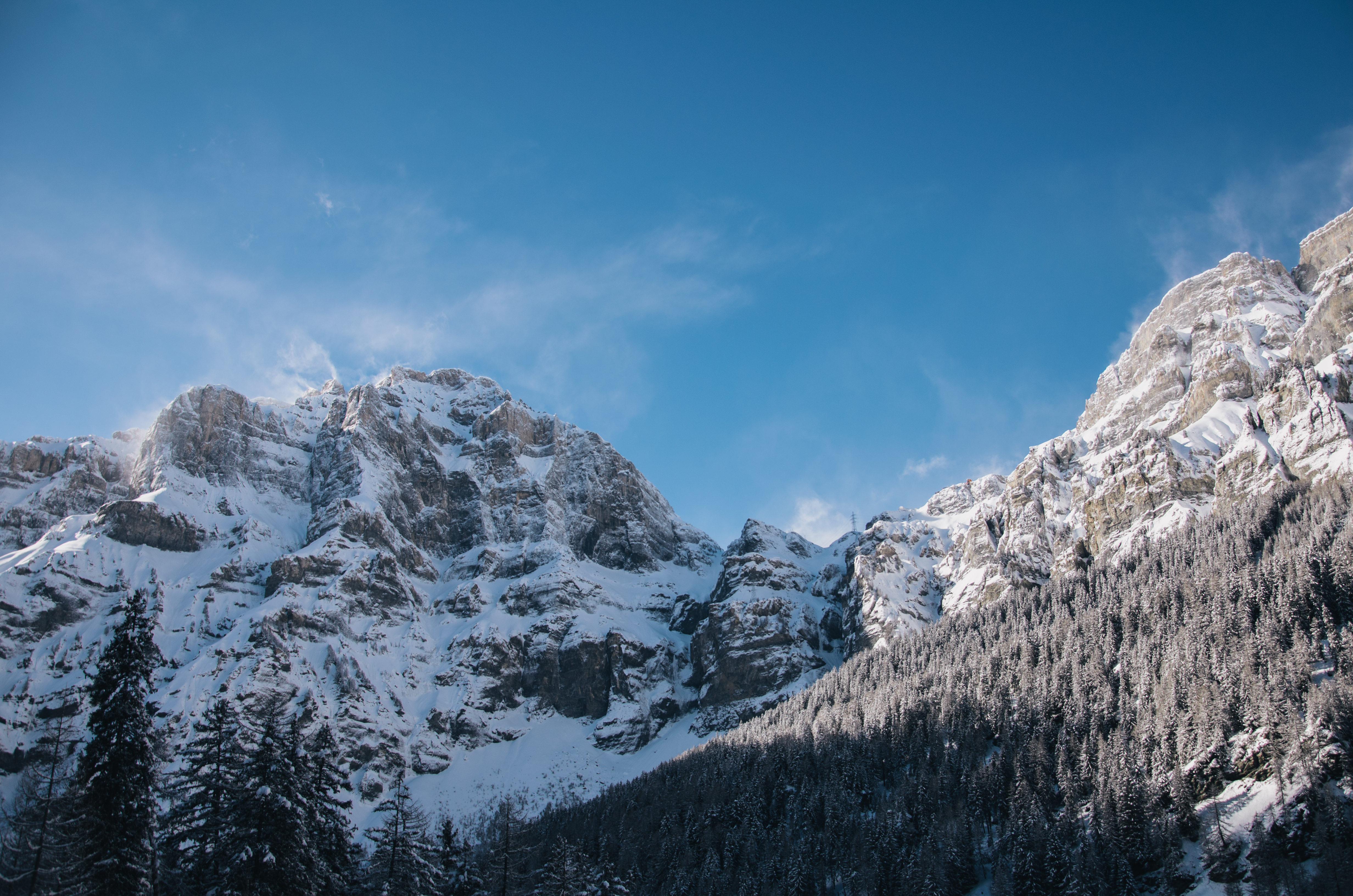 Gemmi Daubenwand